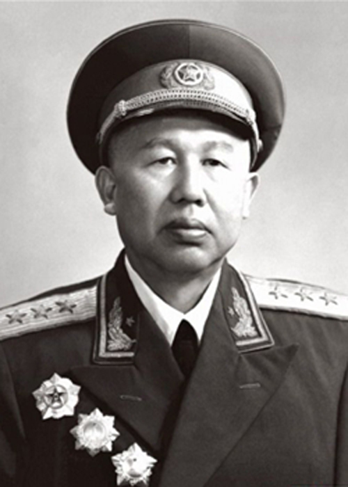 王平授衔照